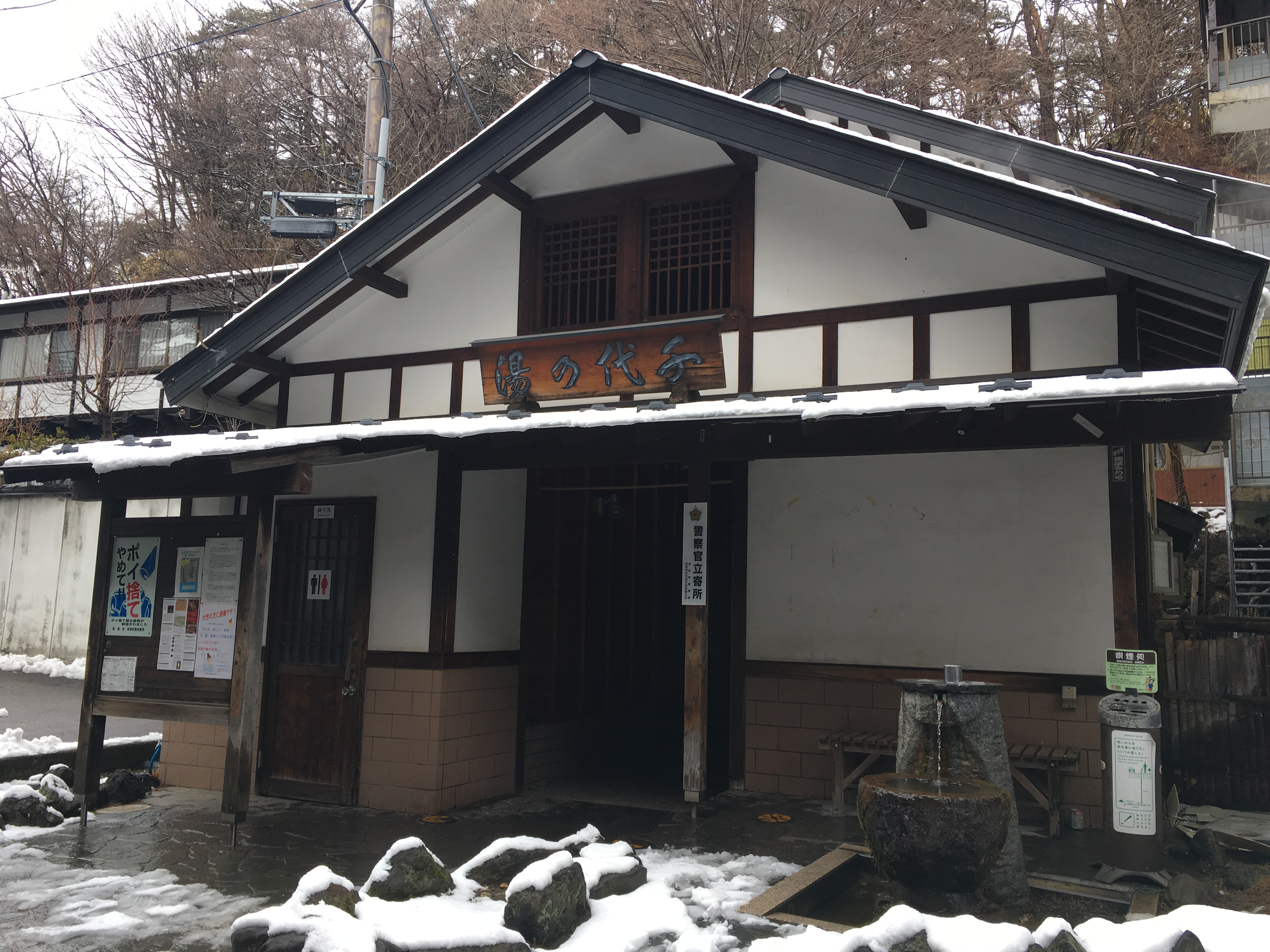 草津温泉の千代の湯